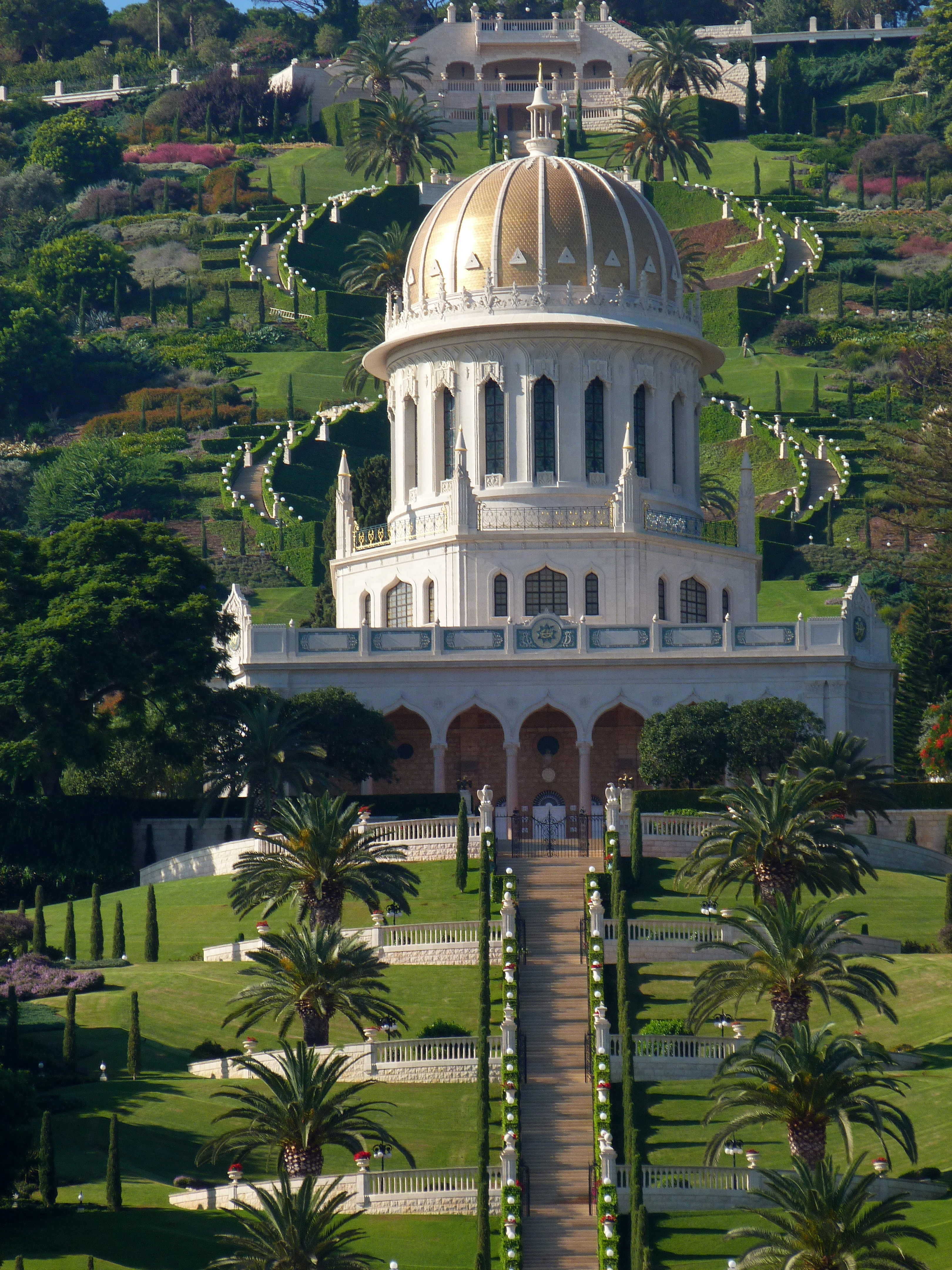 הגנים הבהאיים-המרכז הבהאי העולמי,המתחם הבהאי על הר הכרמל בחיפה